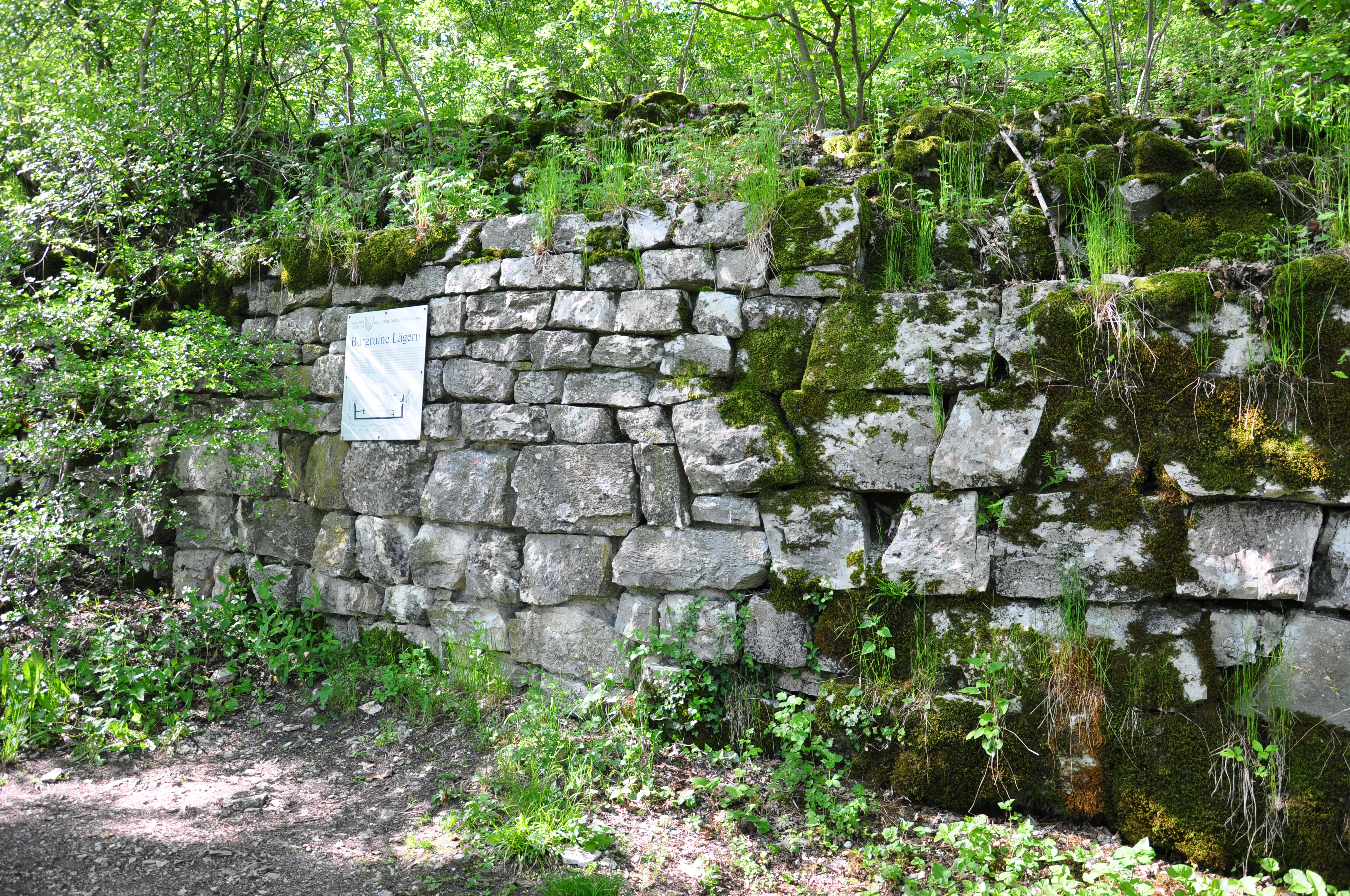 Alt-Lägern in Boppelsen on Lägern (Switzerland)